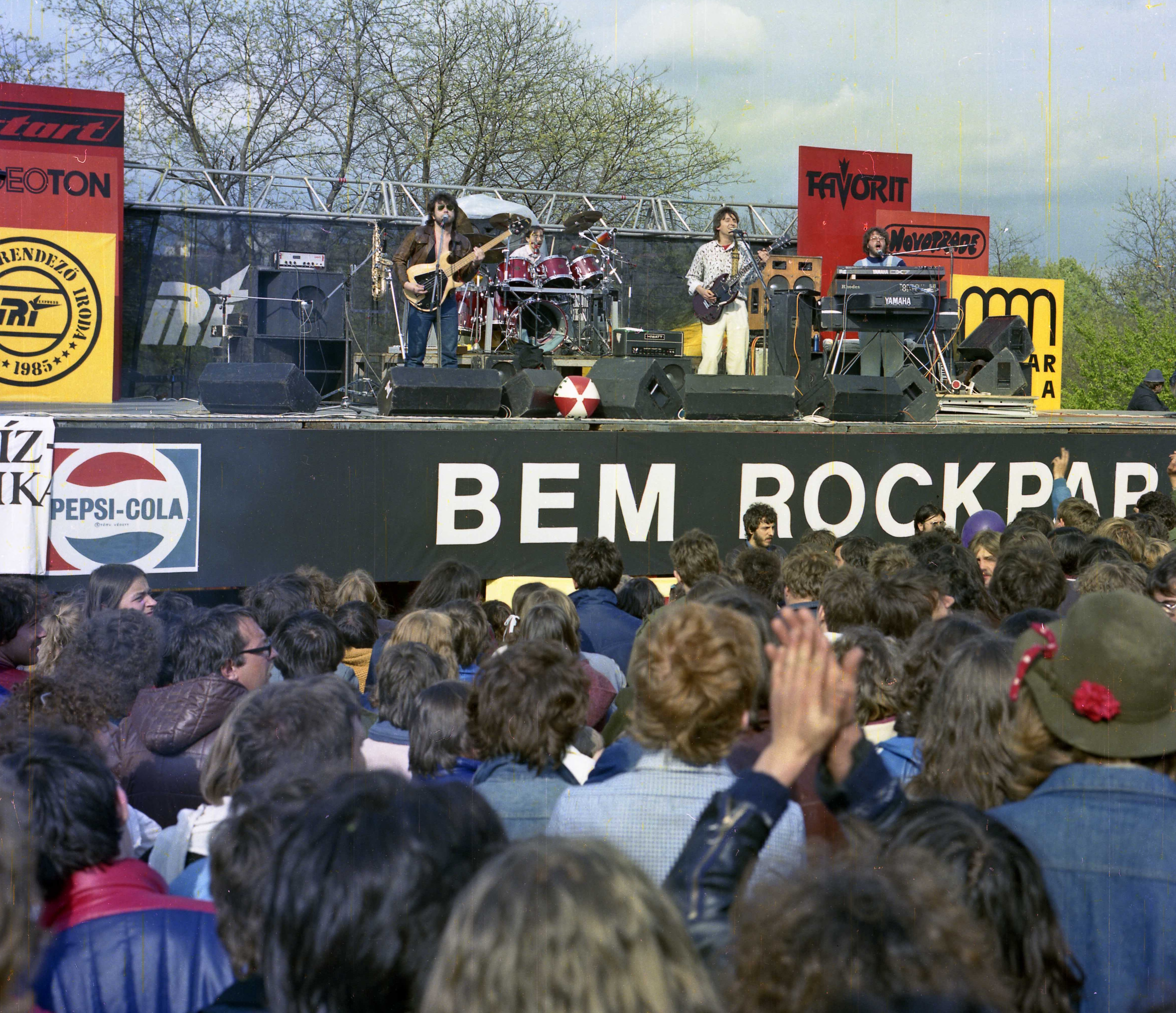 LGT koncert. Location: Hungary, Budapest I., Tabán Tags: colorful, Videoton-brand, Budapest Title: LGT koncert.